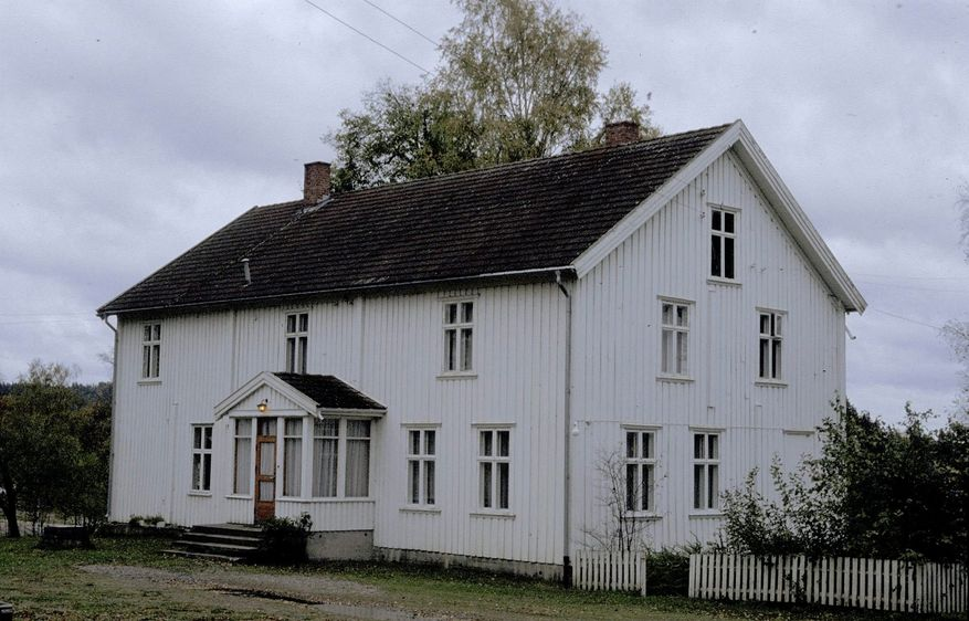 Rødenes prestegård. Foto: Ola Øgar Svendsen. Fra Riksantikvarens Kulturminnesøk.